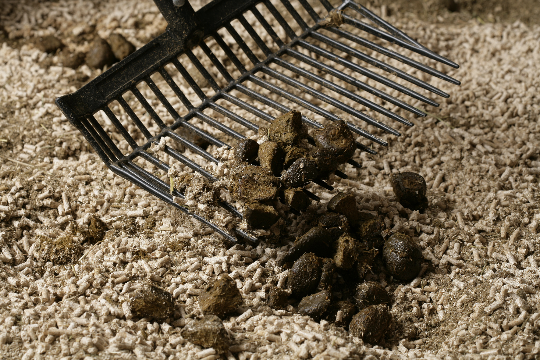 Einstreu, Tiereinstreu, Holzpellets, Pferdehaltung